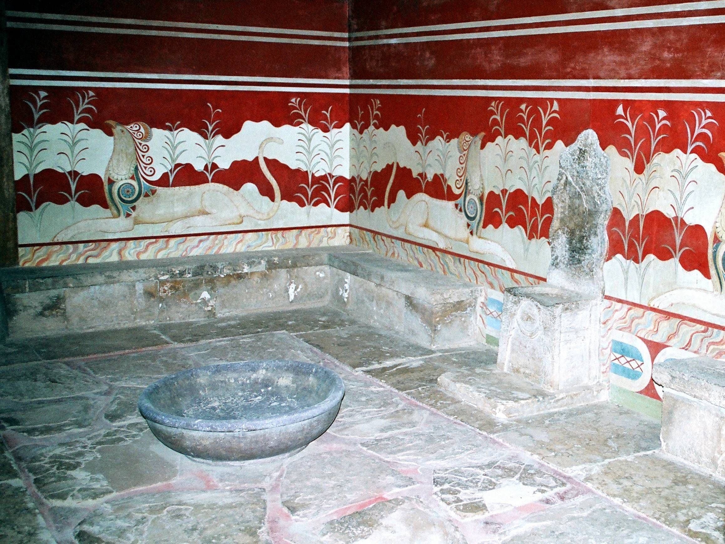 Am 13. April 1900 bei Ausgrabungen entdeckter „Thronsaal“ von Knossos südlich von Iraklio, Kreta, Griechenland